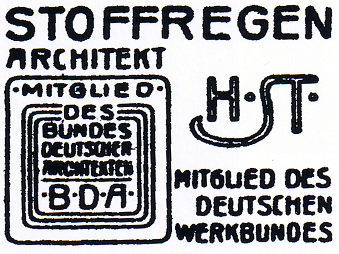 Logo von Heinz Stoffregen